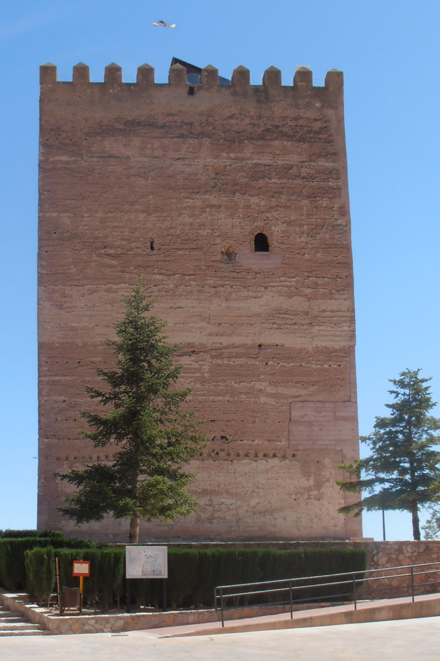 Aledo: Torre de Homenaje from North